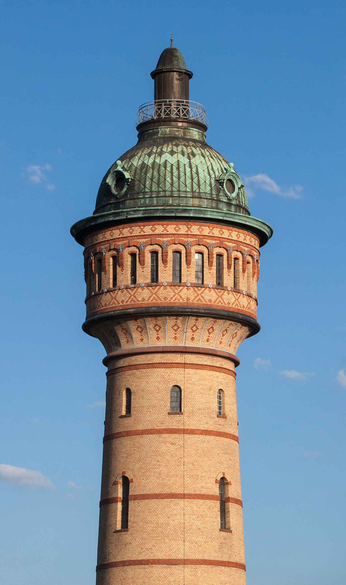 Der Biebricher Wasserturm nahe der Biebrischer Allee, Wiesbaden